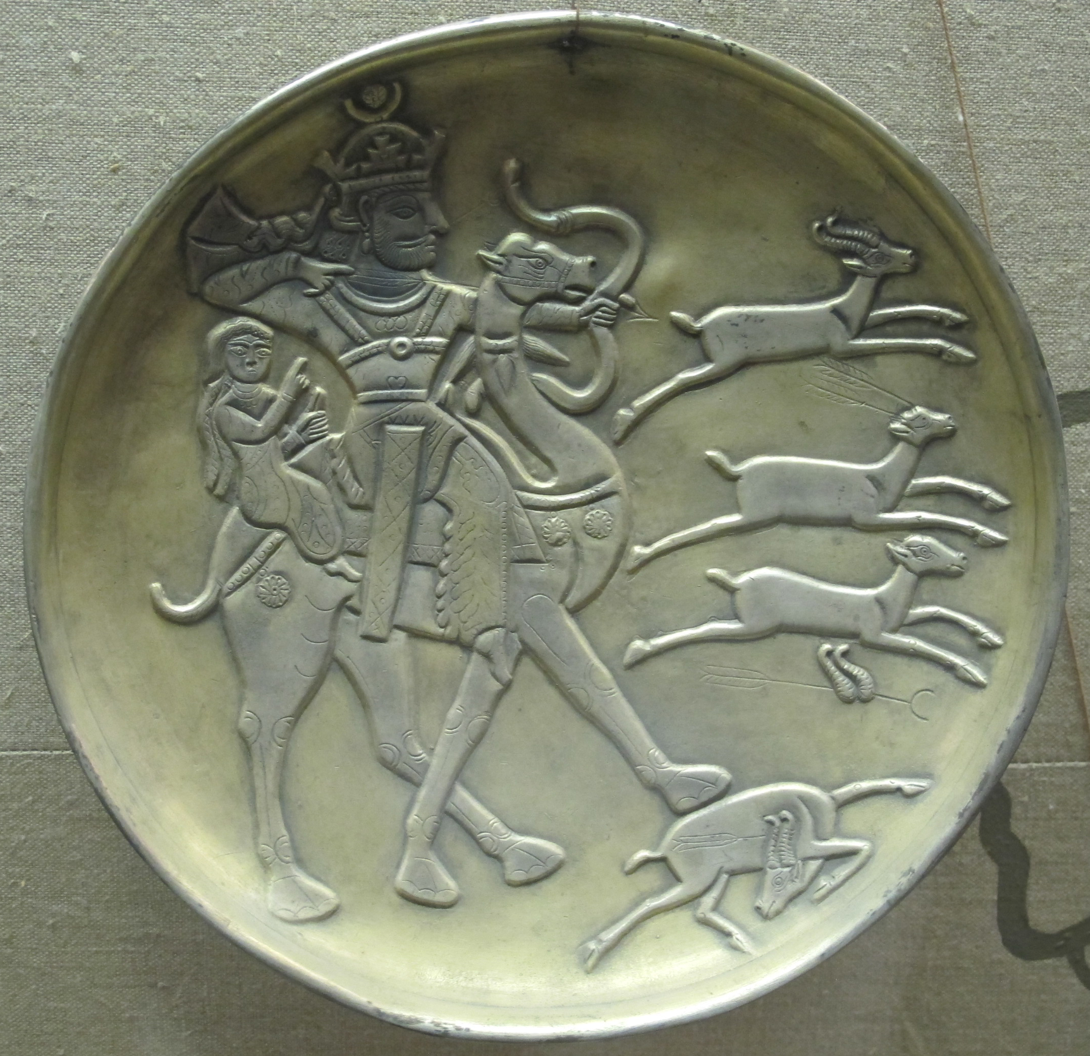 Piatto d'argento da drevnie komi-permyaki, V-VIII sec.